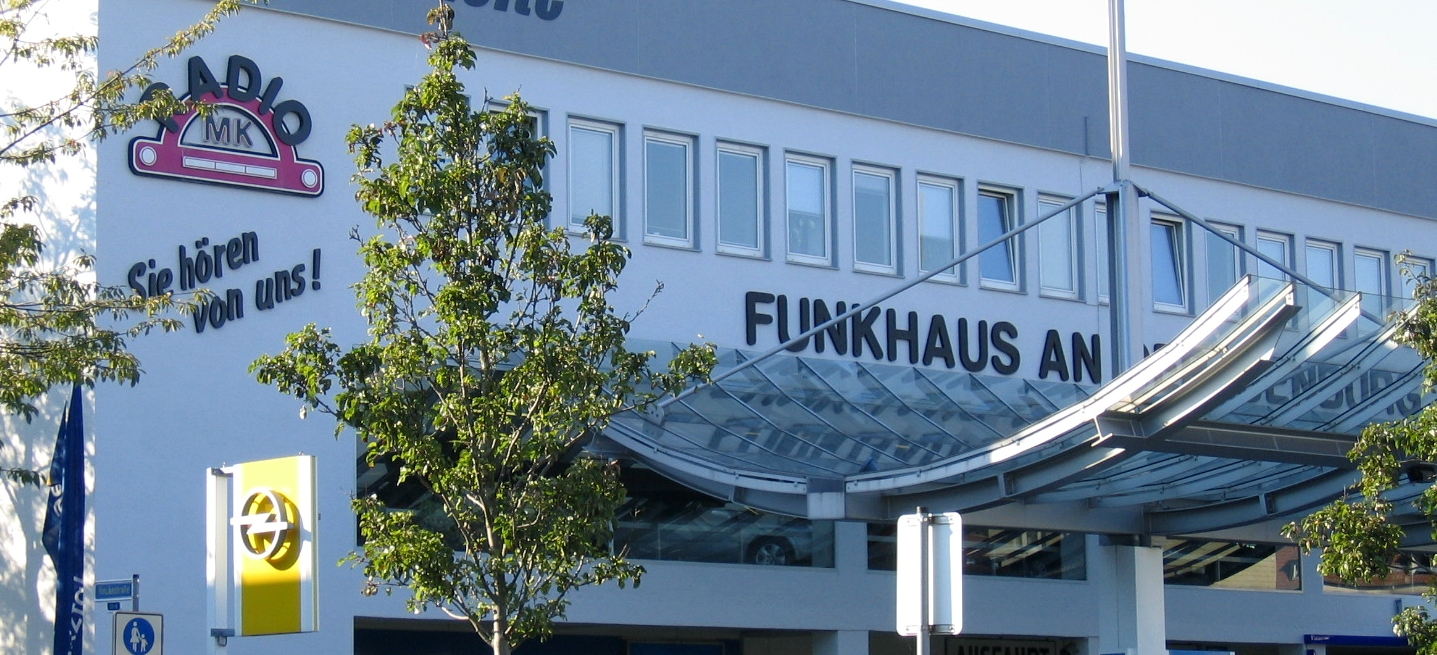 Funkhaus "An der Isenburg" (Teilansicht) in Iserlohn; Radio MK.